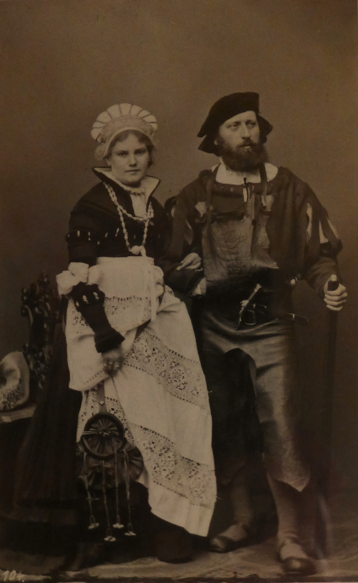 Ehepaar Maria und Georg von Hauberrisser im altdeutschen Kostüm im Jahr 1876 (Sammlung des Stadtmuseums München)